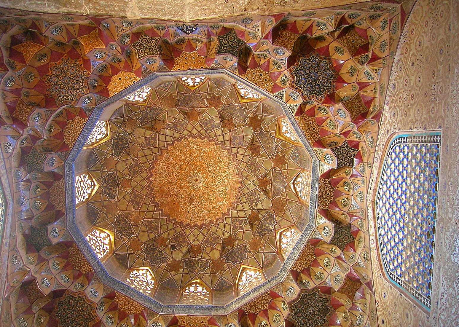 Inside view of Ganjali Khan Mosque, Ganjali Khan Complex, Kerman, Iran